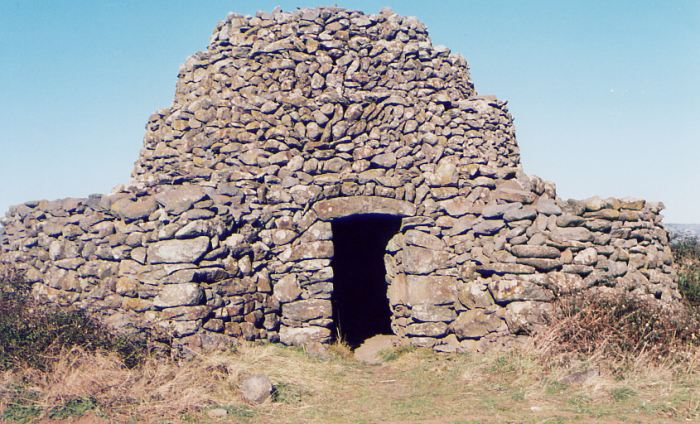 Description: Capitelle du département de l'Hérault, France. Cabane à gradins, construite en blocs de basalte, sur une ancienne coulée de lave. Source: Hugo Soria Licence: GFDL Hugo Soria